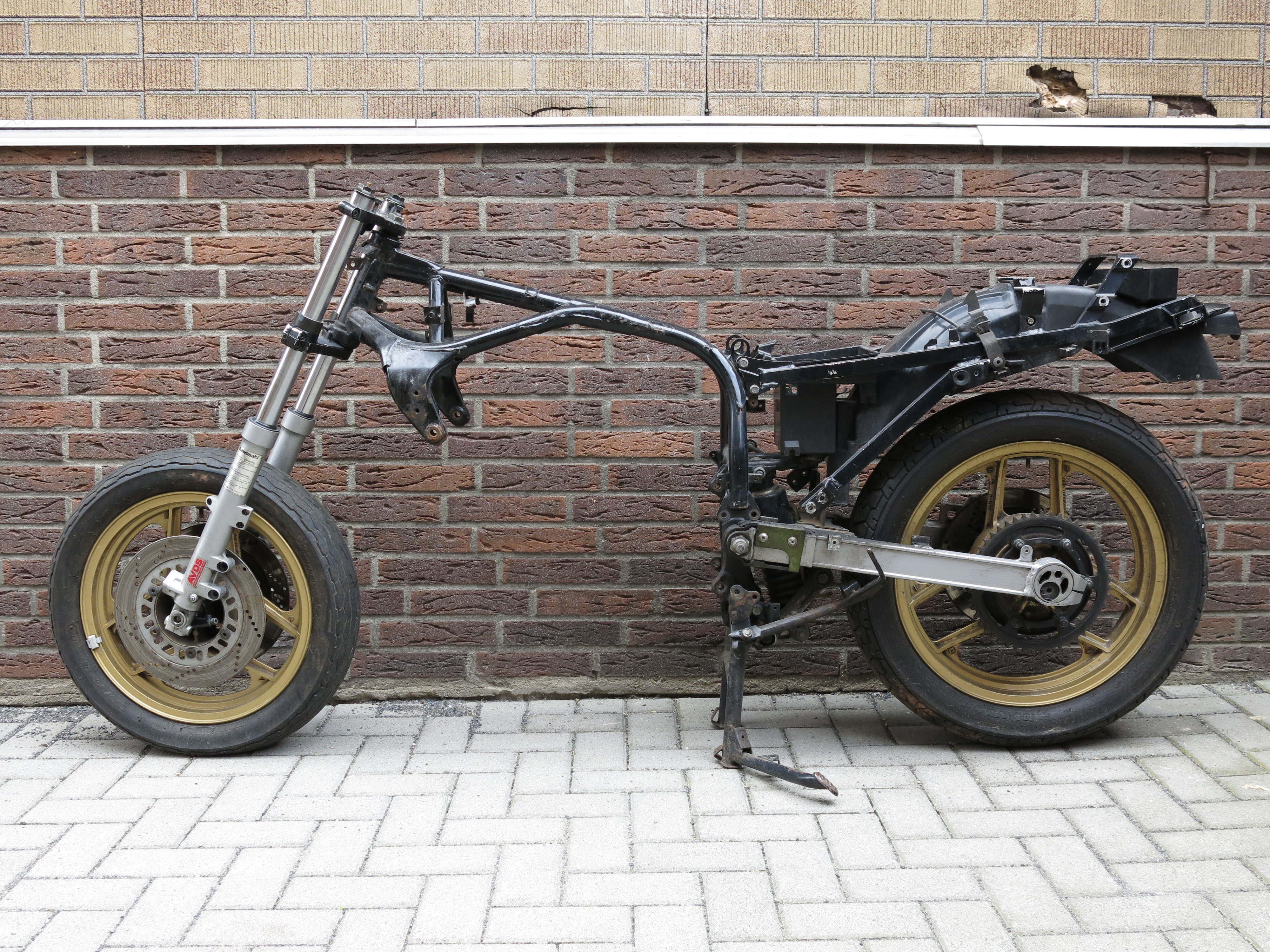 Brückenrohrrahmen, Hersteller Kawasaki Heavy Industries